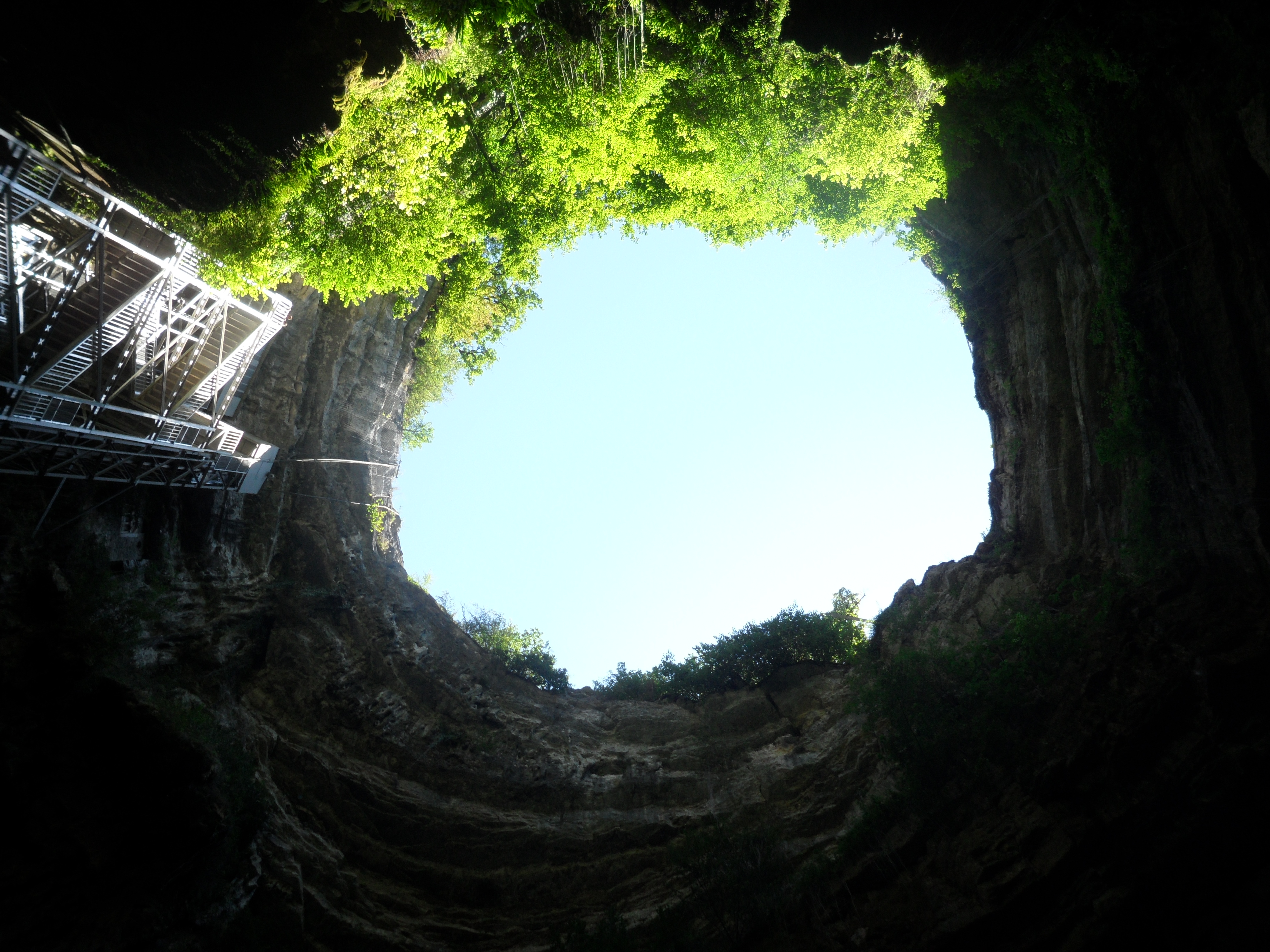 Le gouffre de Padirac